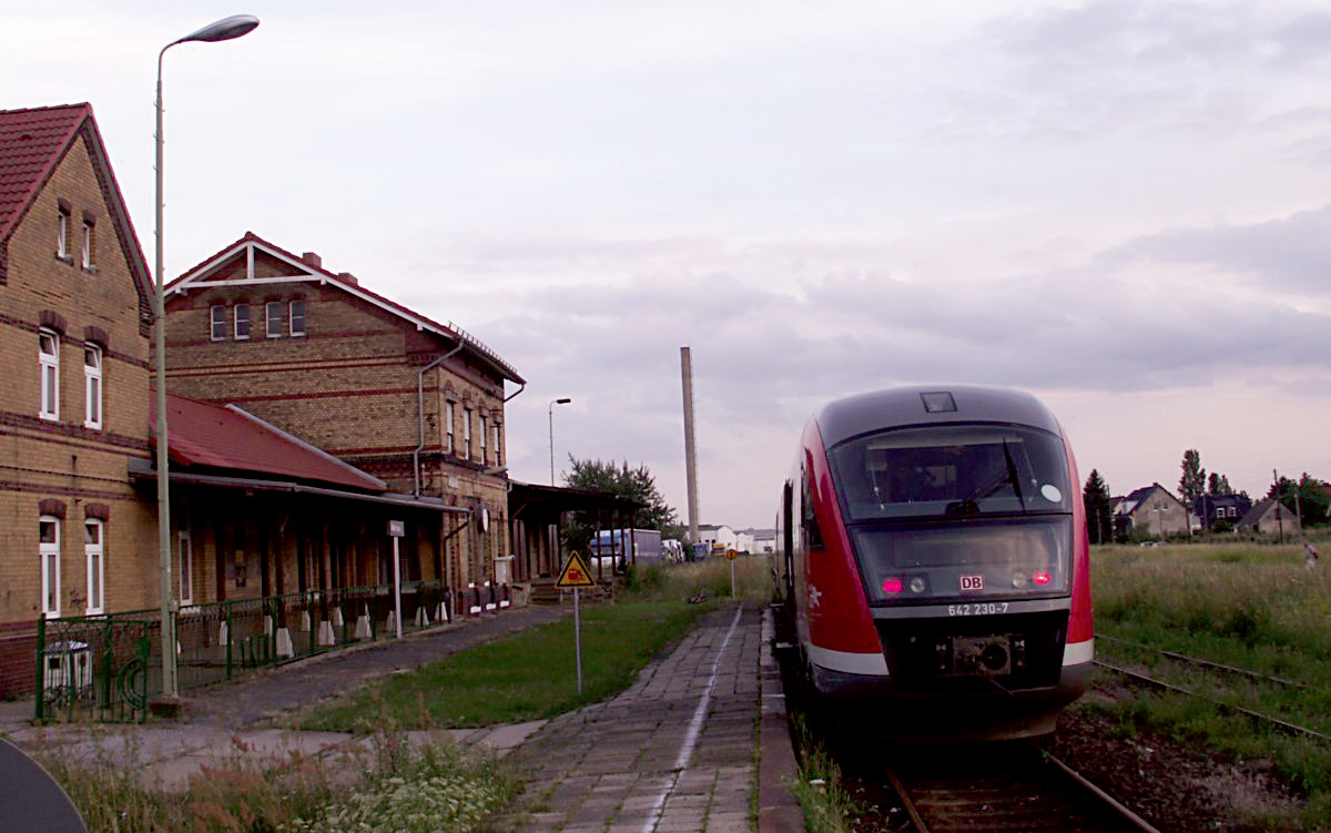 Akener Bahn 2007